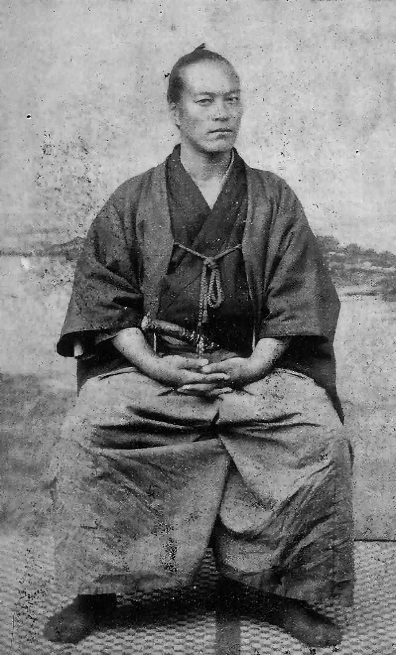 山岡鉄舟 Yamaoka Tessyu.鶏卵紙